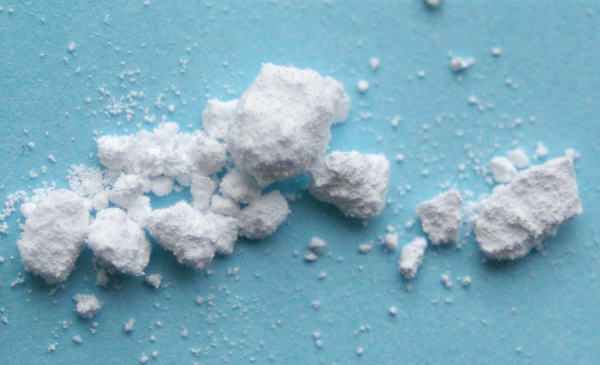 SrO poeder